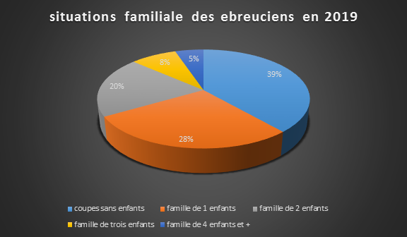 répartions de la Situations familiale des ebreuciens en 2019 sous forme de diagramme circulaires .La source d'informations